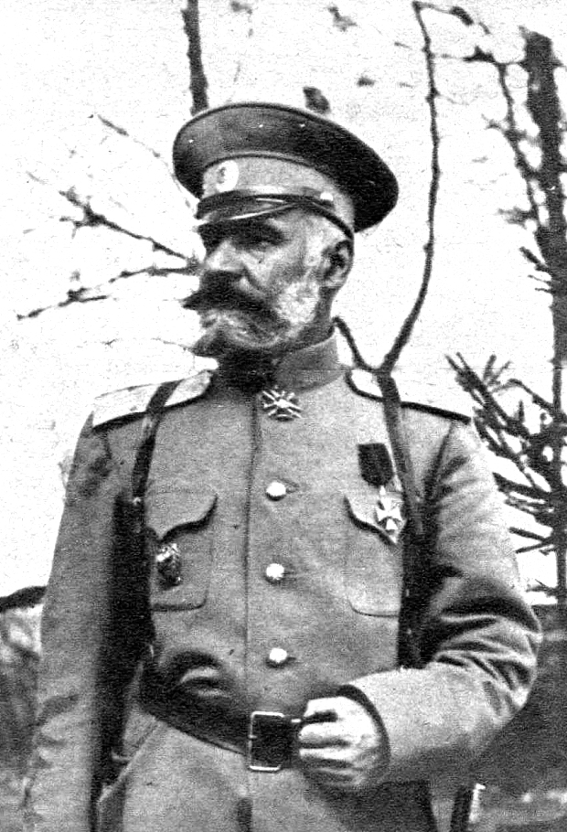 Командующий дивизией генерал-майор Широков Виктор Павлович